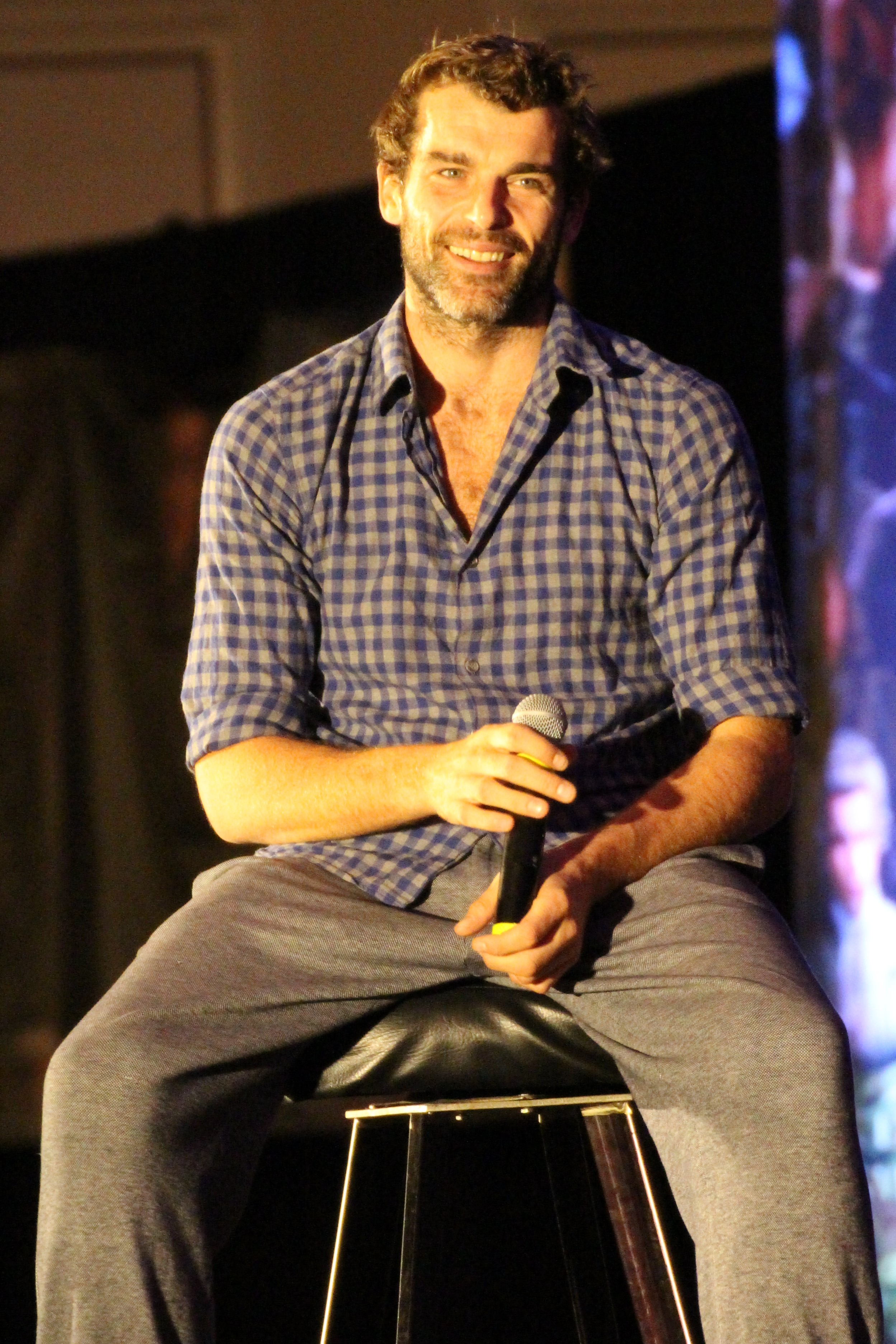 Stanley Weber auf einer Outlander Convention in Las Vegas am 14. Juli 2018.